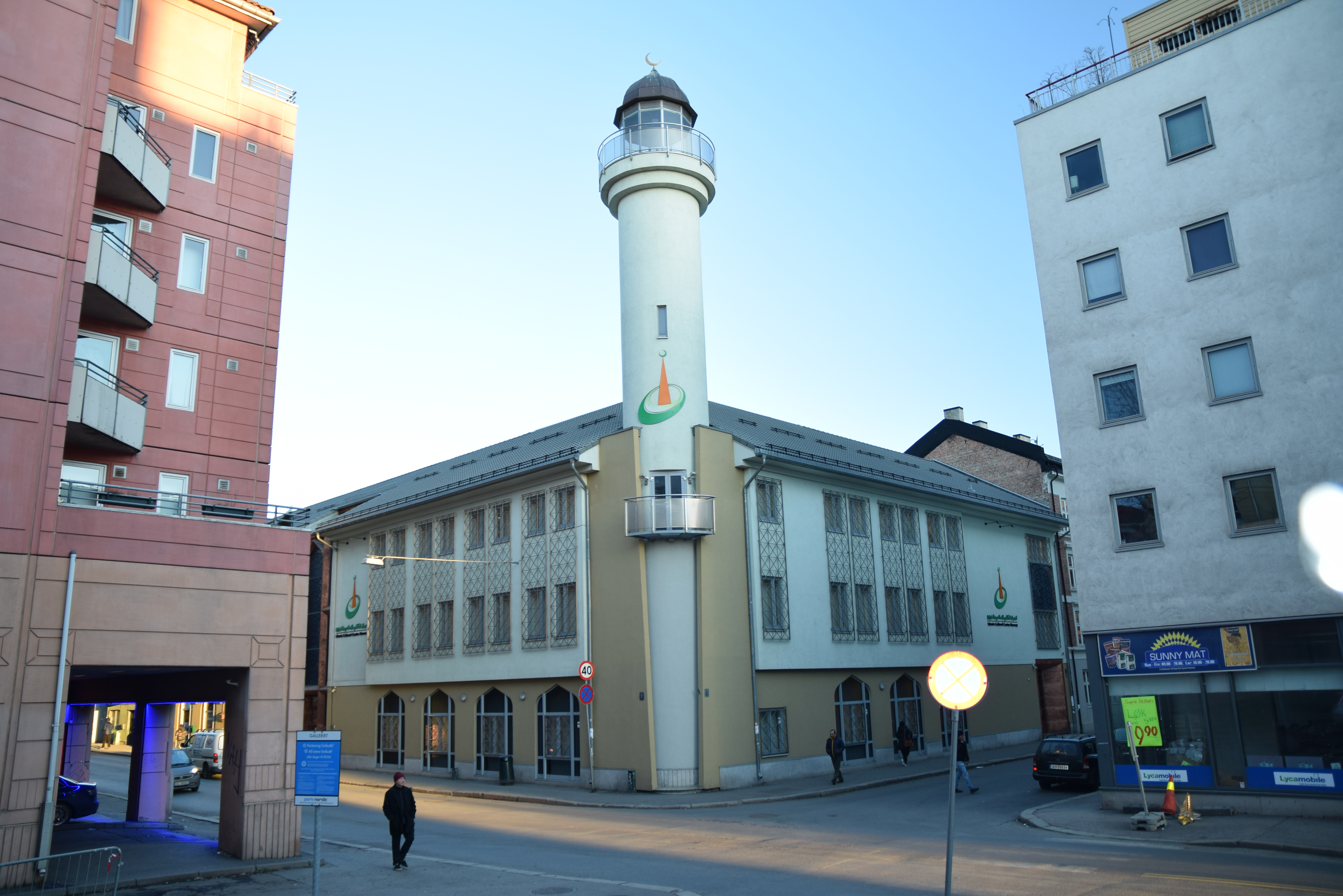 Islamic Cultural Centre Norway, Tøyenbekken 24, Grønland, seen from Galleri Oslo